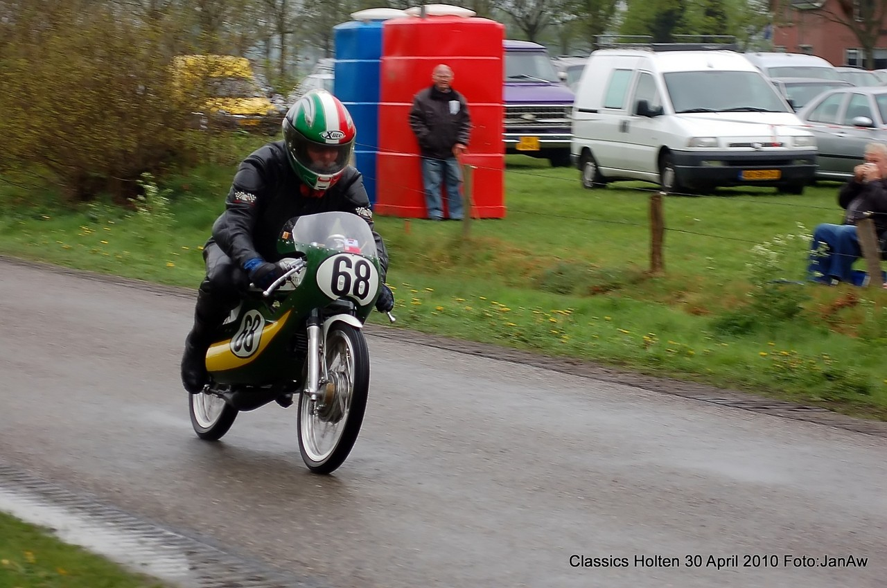 Joep Sanders sulla Minarelli Pasotti 50 GP del 1972